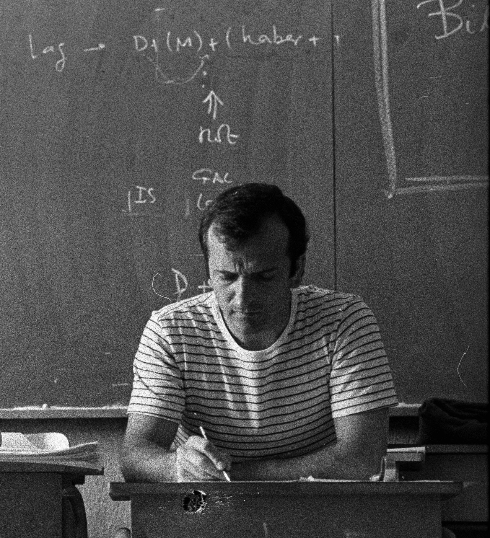 Jose Ramon Etxebarria 1984an Udako Euskal Unibertsitatean